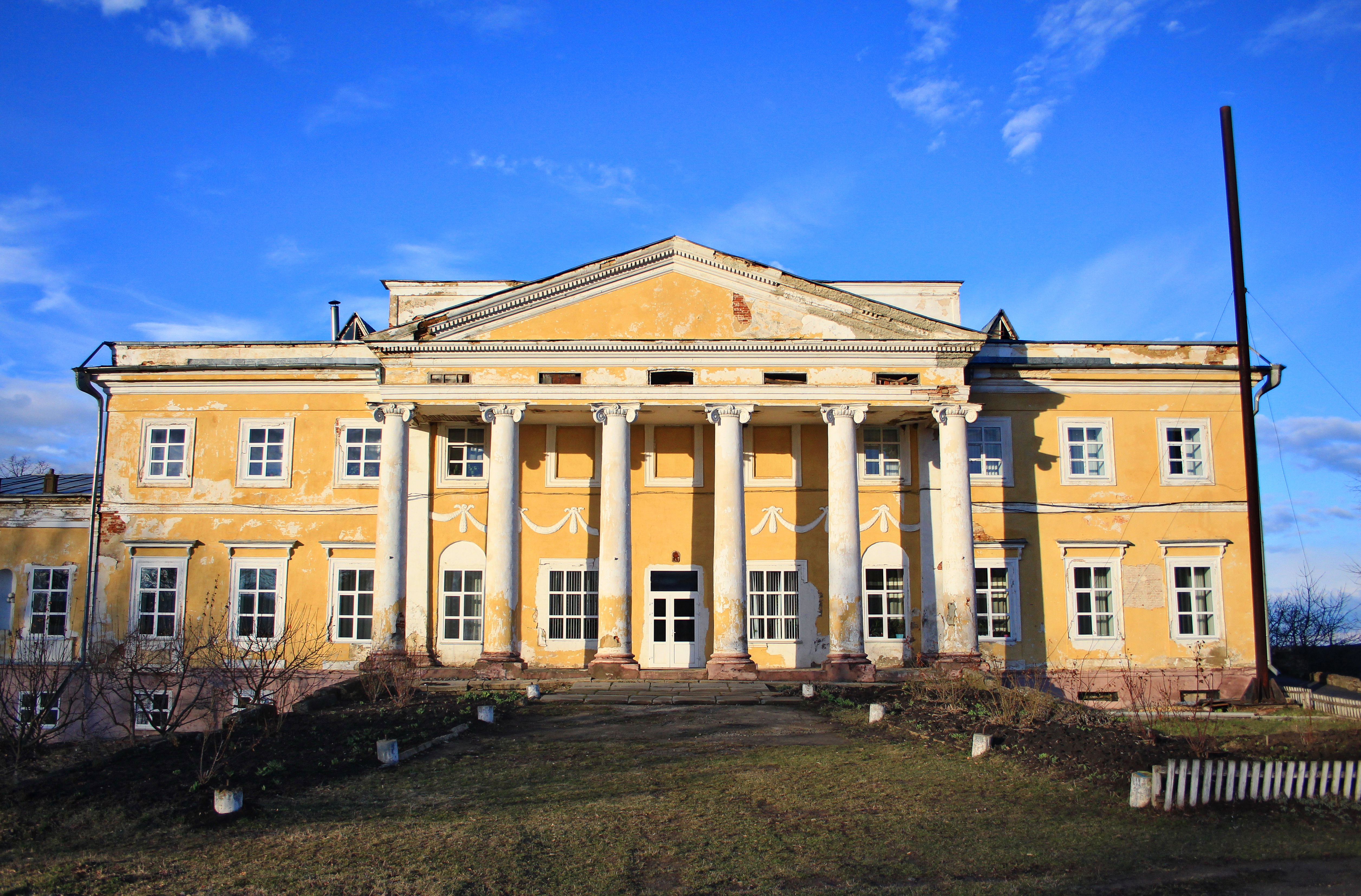 Садиба графів Чорномських, Чорномин